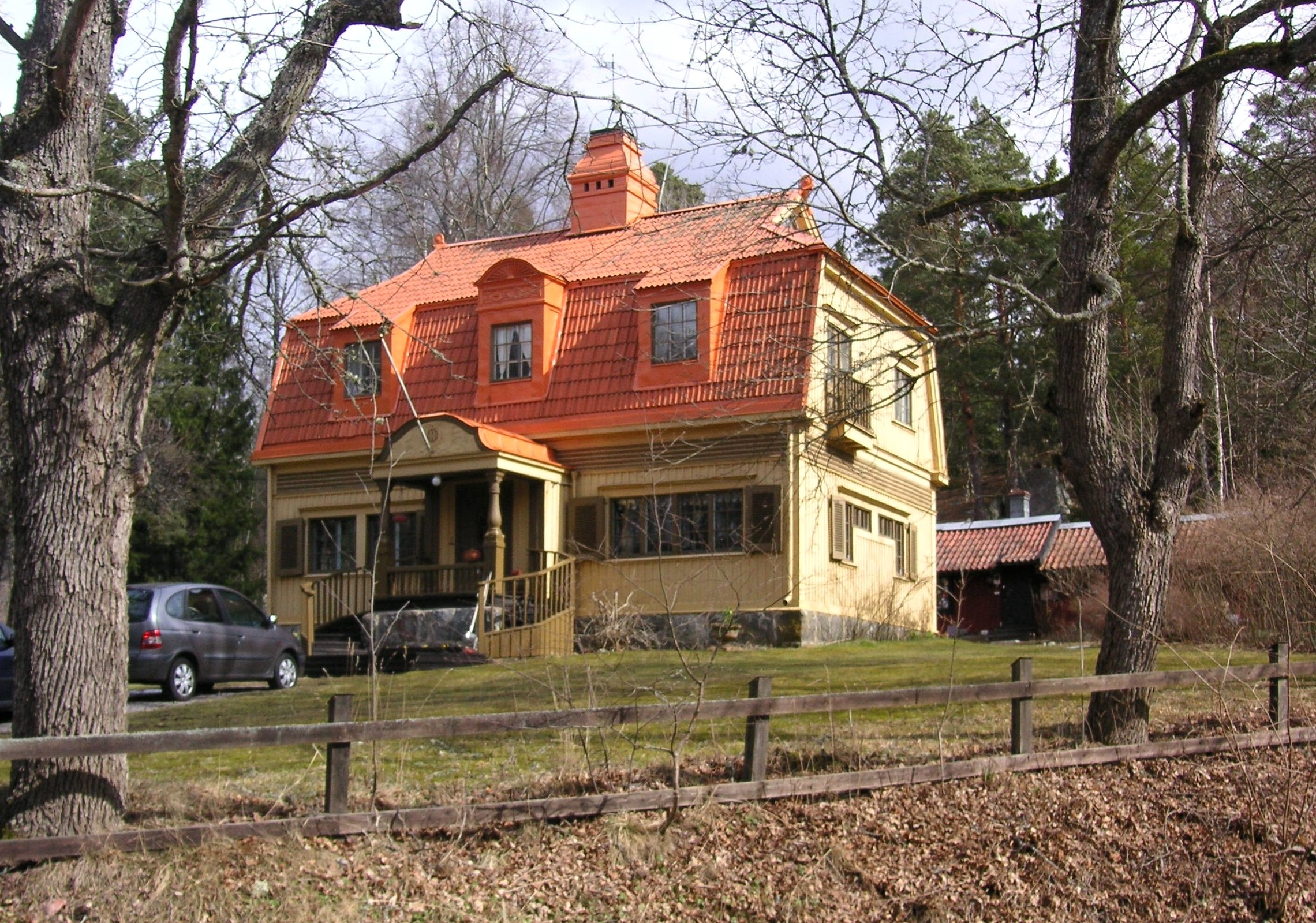 Masmo gård / villa och bakom den syns Masmotorpet